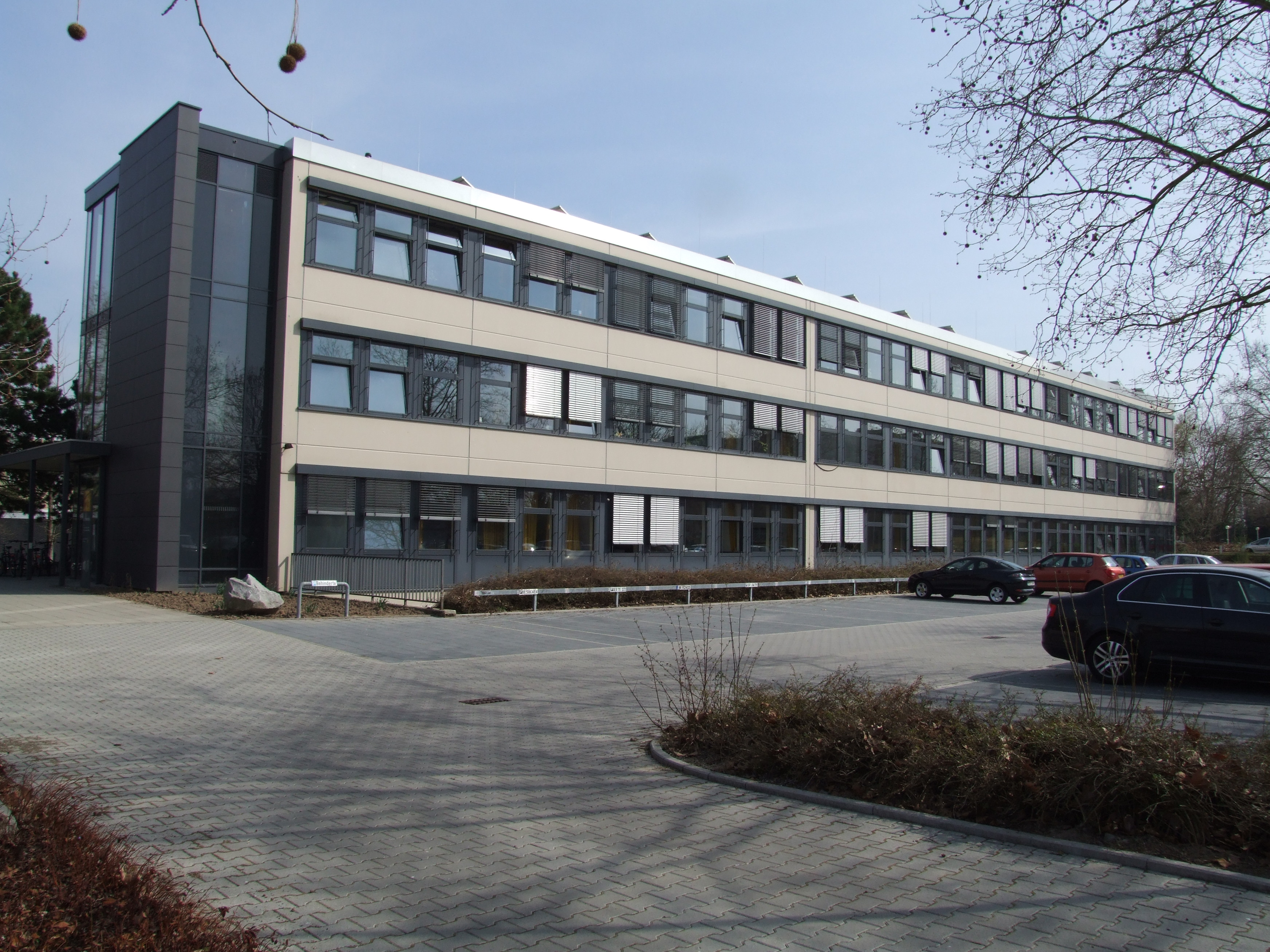 Anbau für das Deutsche Forschungsinstitut für öffentliche Verwaltung Speyer; von Westen